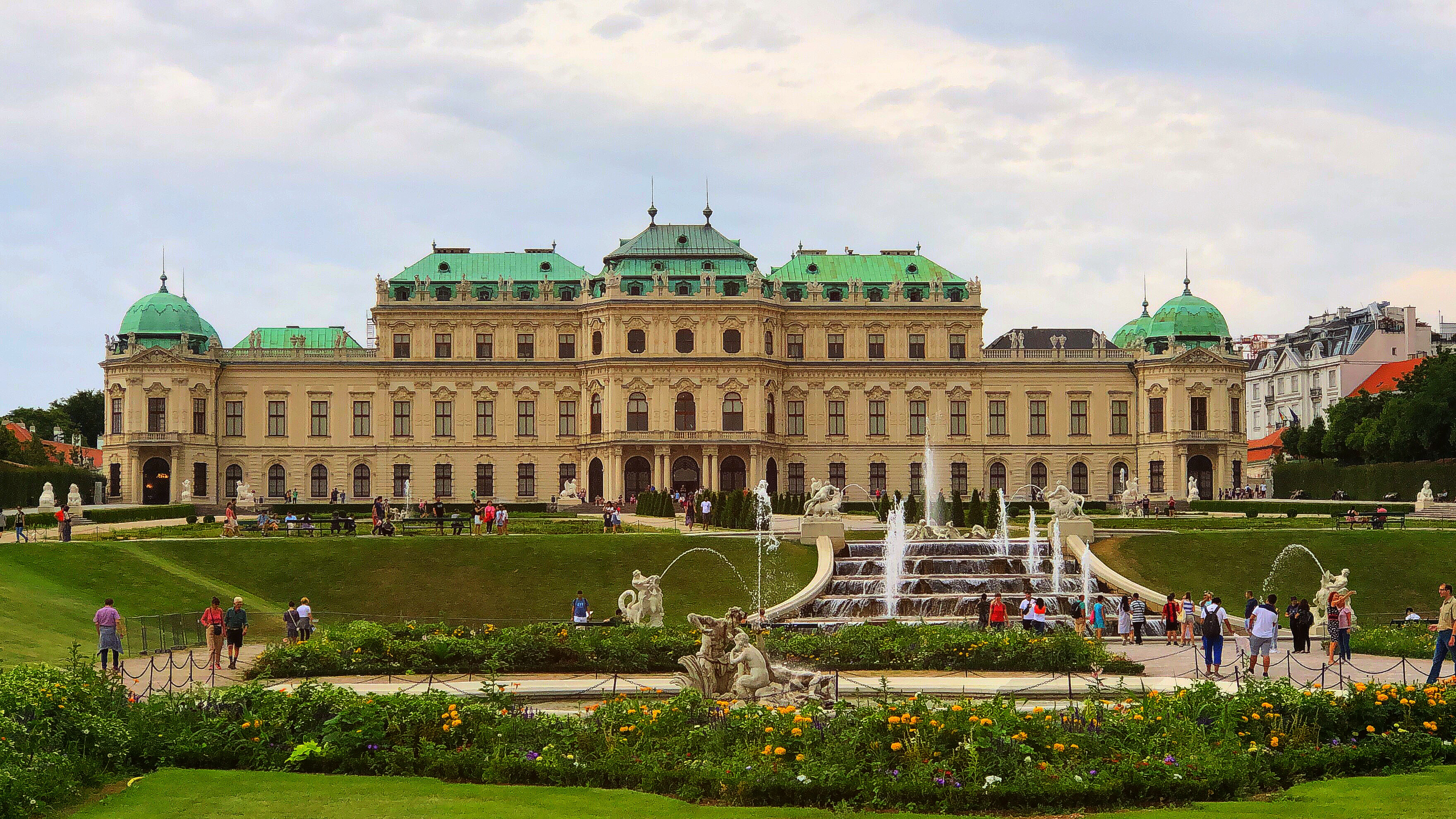 Botanischer Garten Der Universität, Wenen, Oostenrijk, August 2019